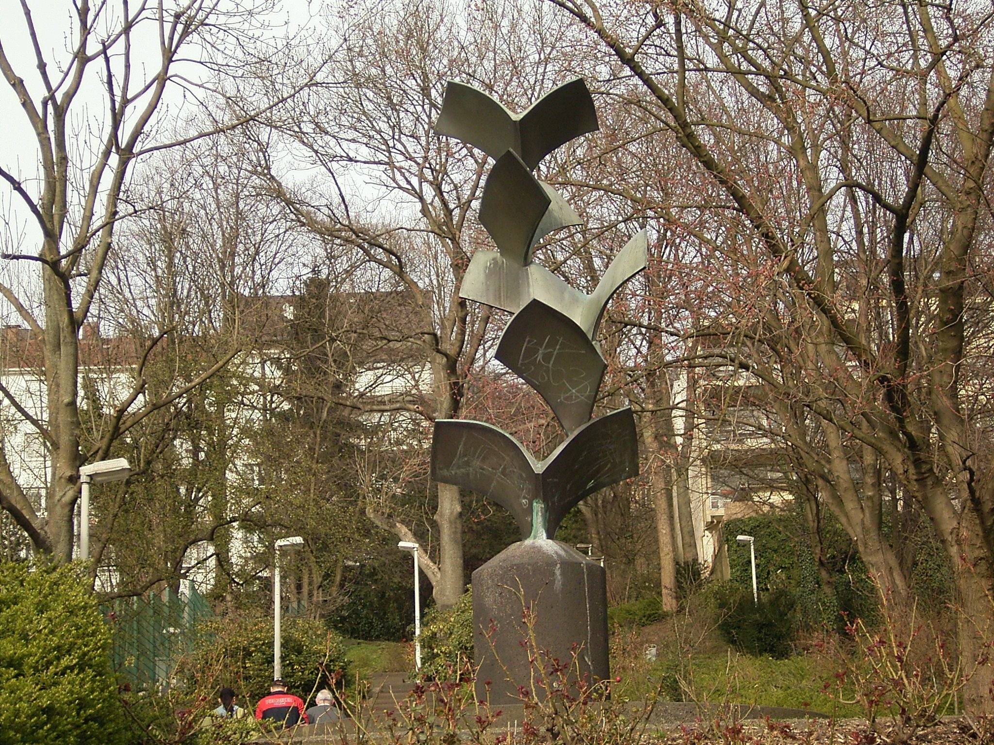 Georg-Abeler-Treppe in Wuppertal